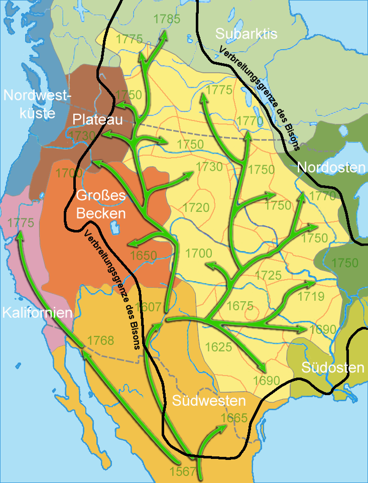 Ursprüngliche Territorien der Prärie-Indianer unter Bezugnahme auf die Verbreitung des Bisons und die Ausbreitung des Pferdes